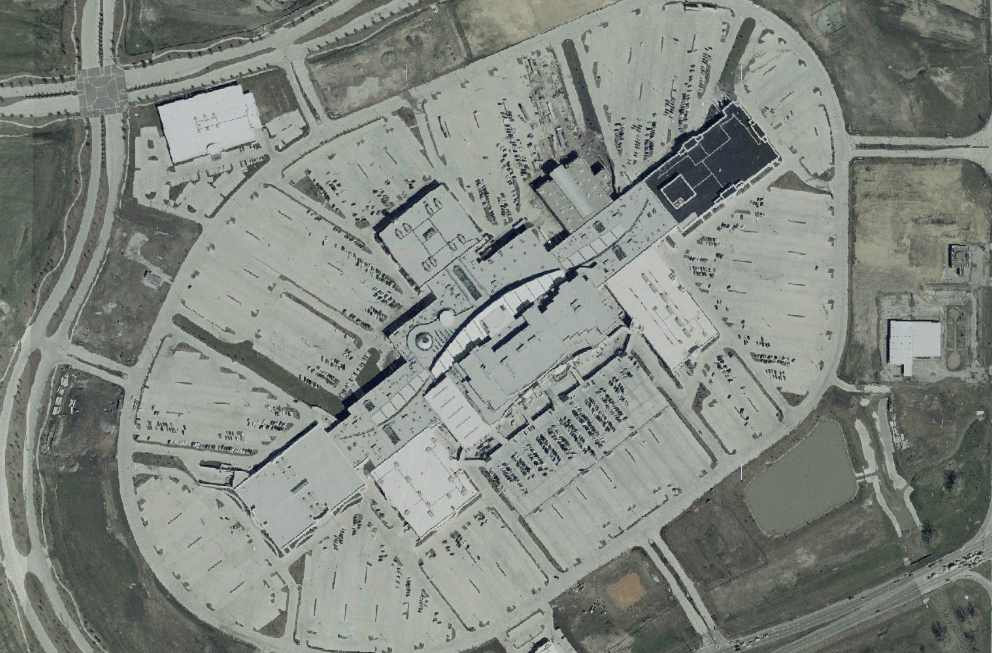 nasa world wind 1.3.5